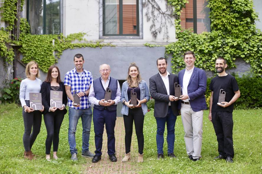 2019ko CAF-Elhuyar sarien irabazleak: Itziar Urizar Arenaza, Maider Beitia San Vicente, Iñaki Sanz-Azkue, Jesus Mari Txurruka Argarate, Izaro Zubiria Ibarguren, Iñigo González de Arrieta Martínez, Iker González Cubiellarena eta Martin Etxauri Sainz de Murieta.